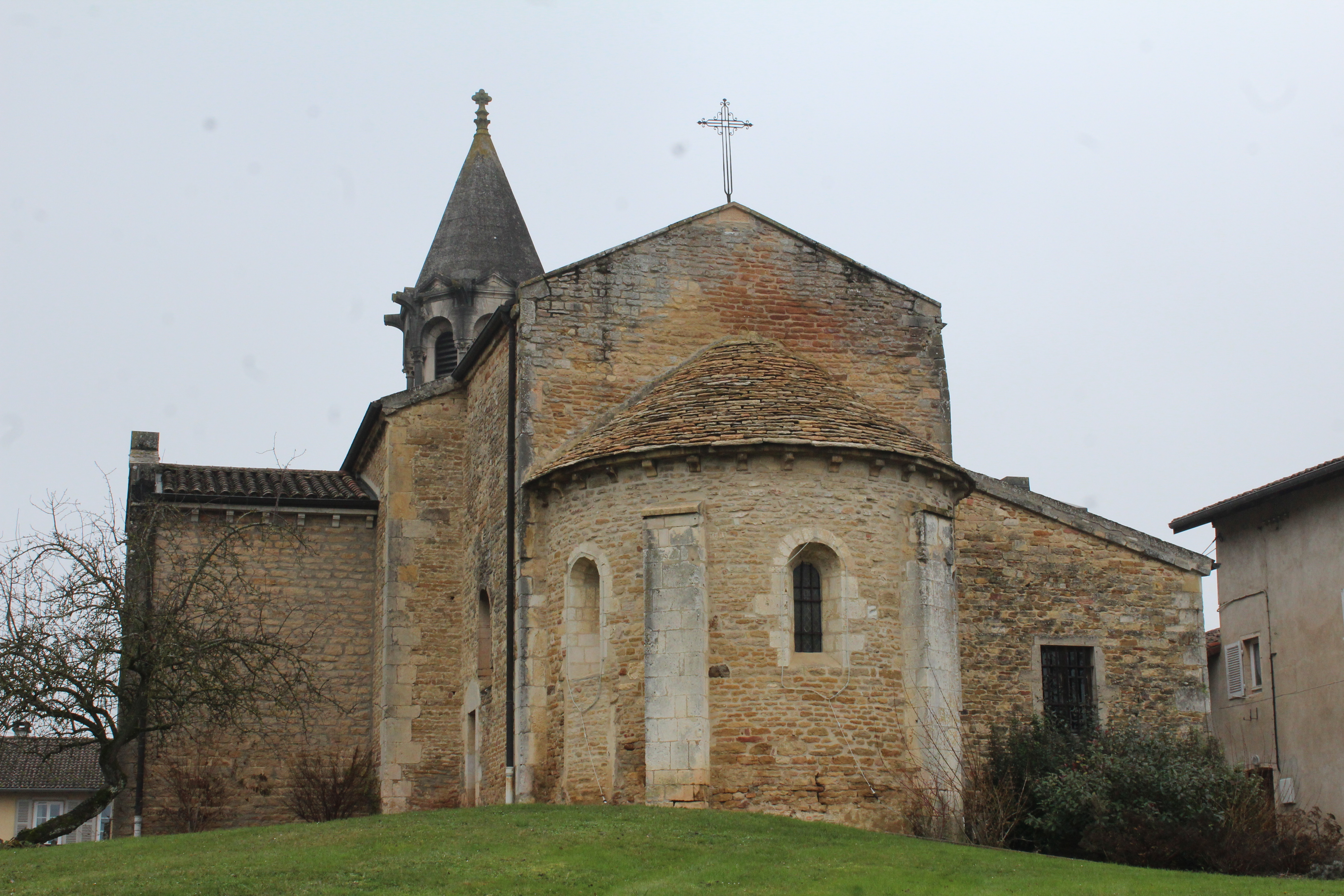 Église Saint-Symphorien d'Illiat.